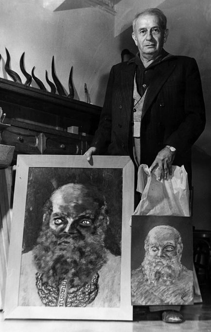 Samuel Grodzensky con el mismo cuadro en pastel y en lana.